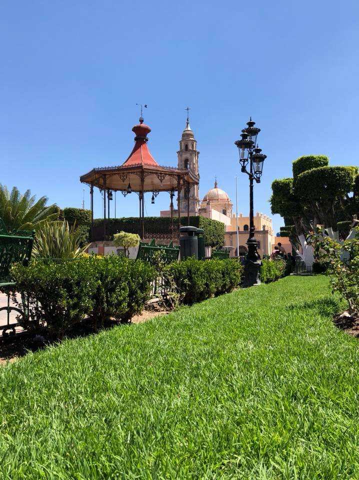 Centro Histórico de Uriangato, Gto